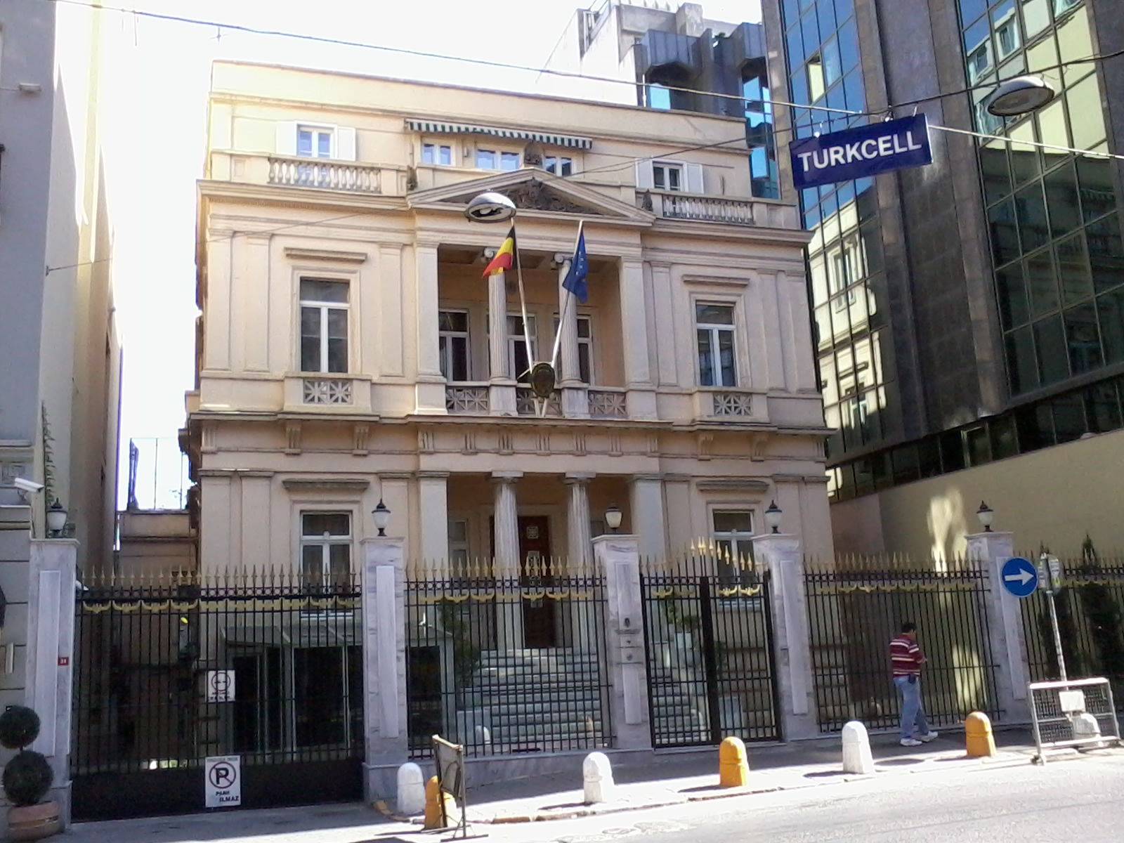 İstanbul'daki Belçika Konsolosluğu.